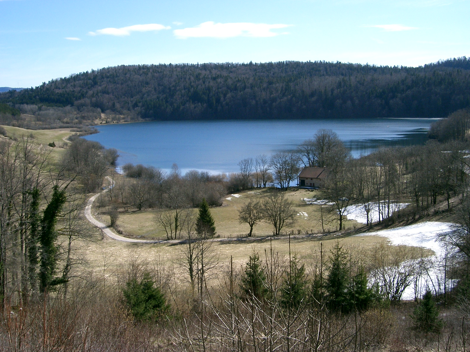 lac de Narlay - département du Jura (39) - France self made PRA